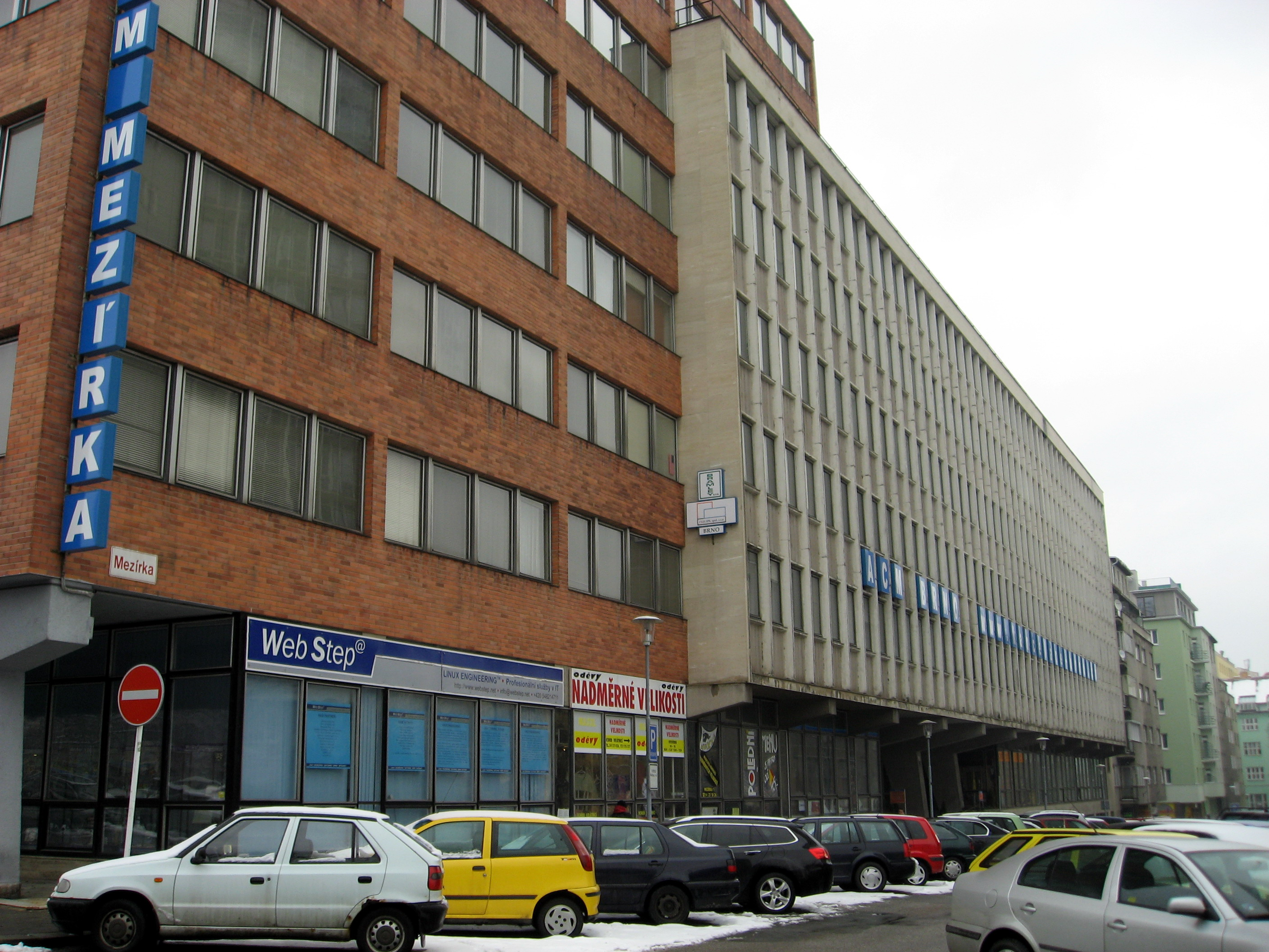 ulice Mezírka